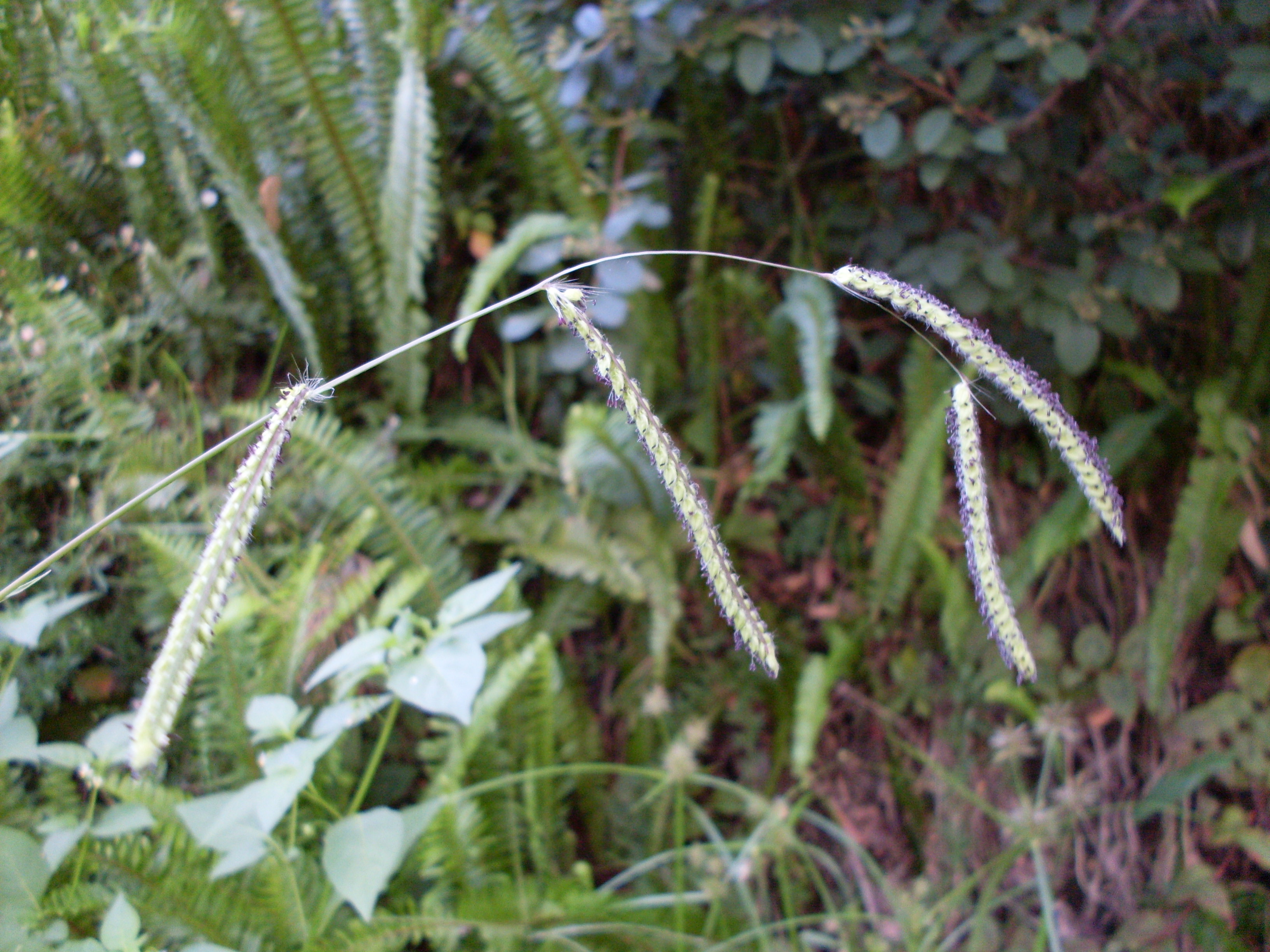 Paspalum (Paspalum dilatum) aka bloody paspalum is a weed that I don't like. Jannali NSW Australia, December 2008.